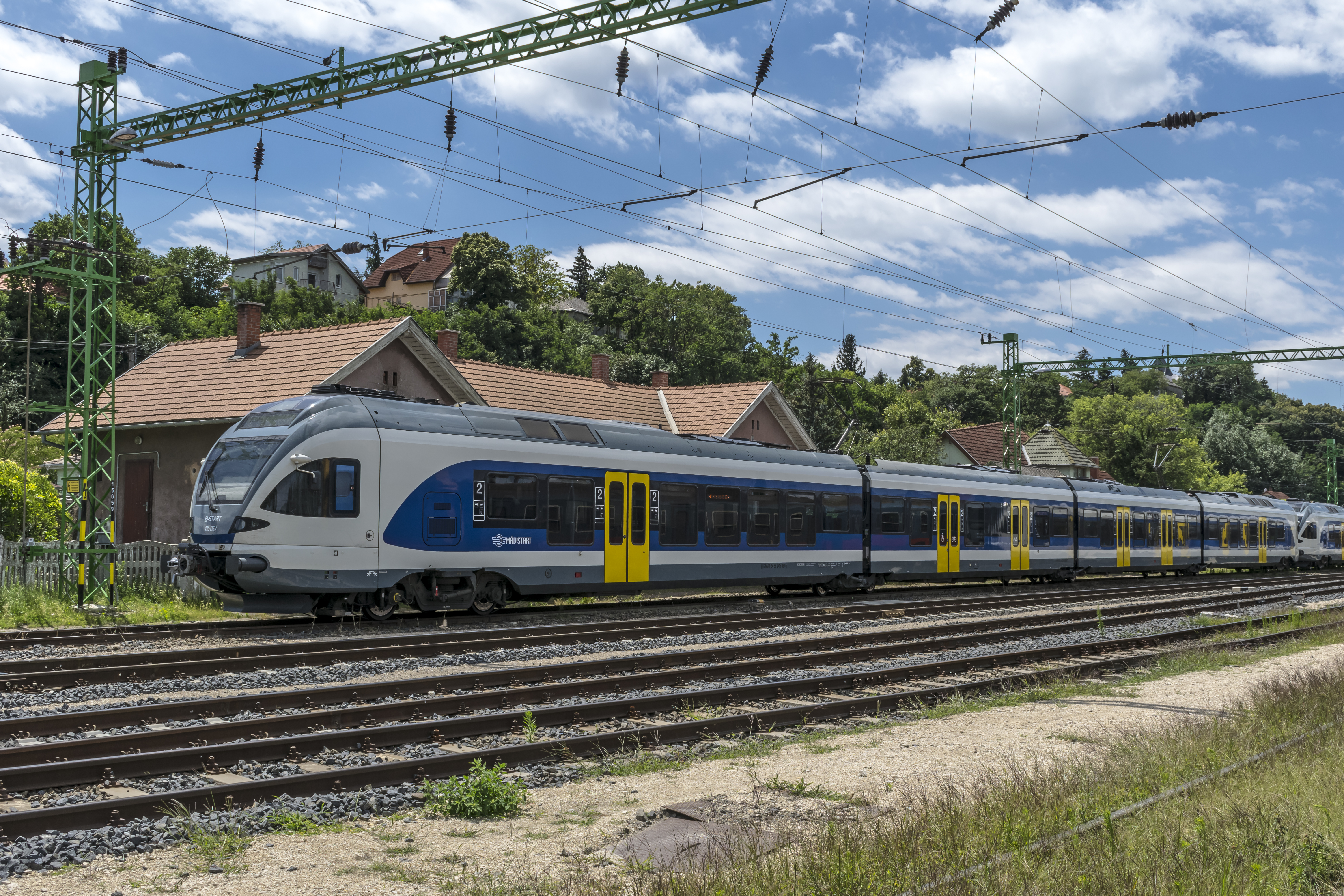 A kép készültekor a tárolón állt.